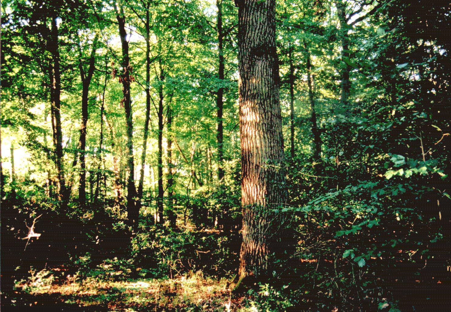 Ahrenshooper Holz im Spätsommer. Eigene Fotografie im September 2006.